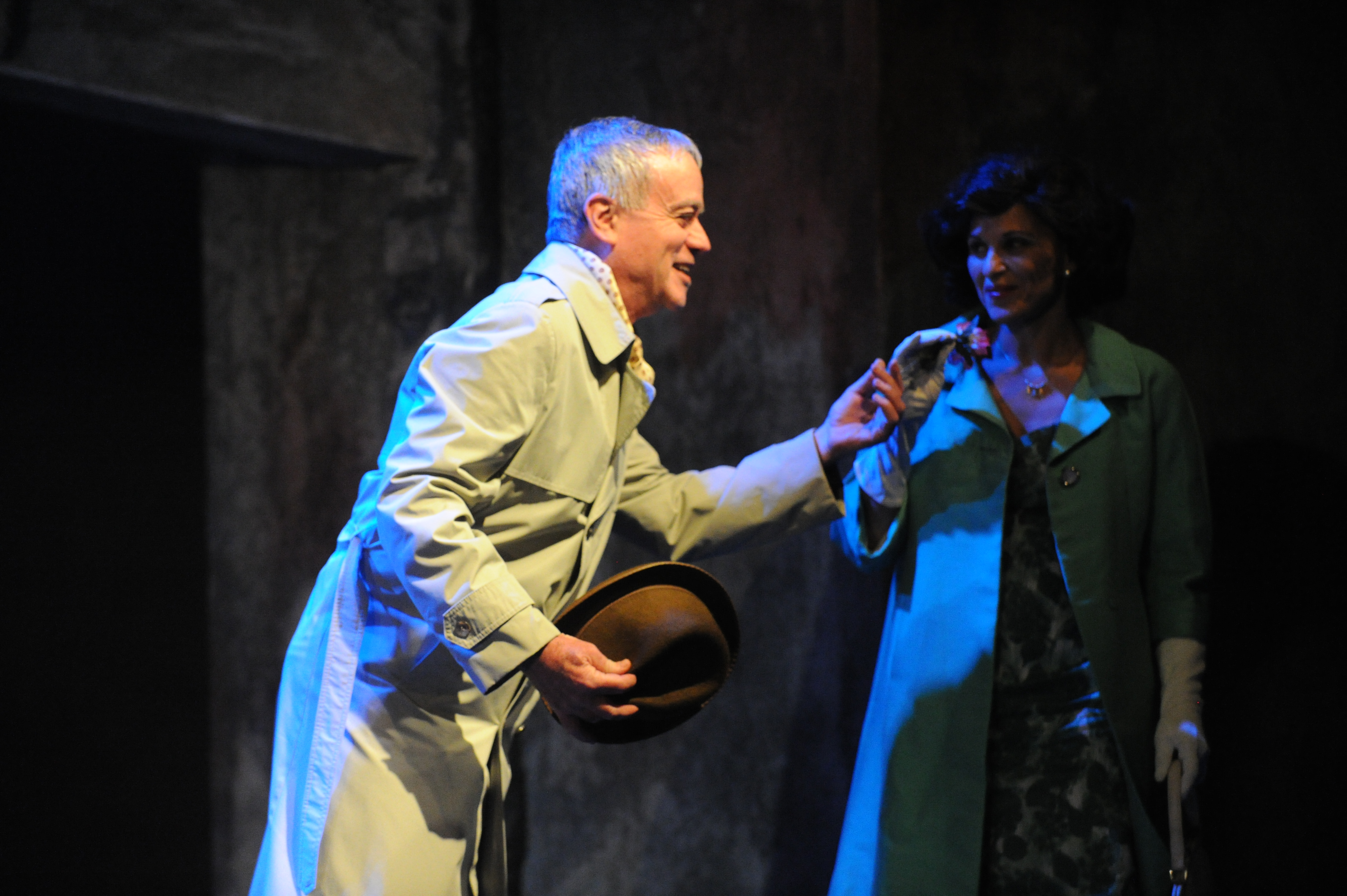 כרמית מסילתי-קפלן ויהויכין פרידלנדר, בהצגה "חוקר פרטי", מאת ובבימויו של מיקי גורביץ', תיאטרון החאן, 2011